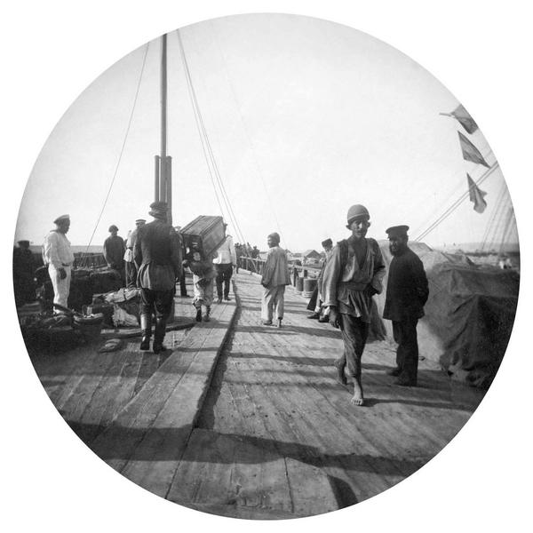 Фотопленки Поля Надара (1890). Пароход Баку — Узун-Ада. Порт Узун-Ада. Пирс